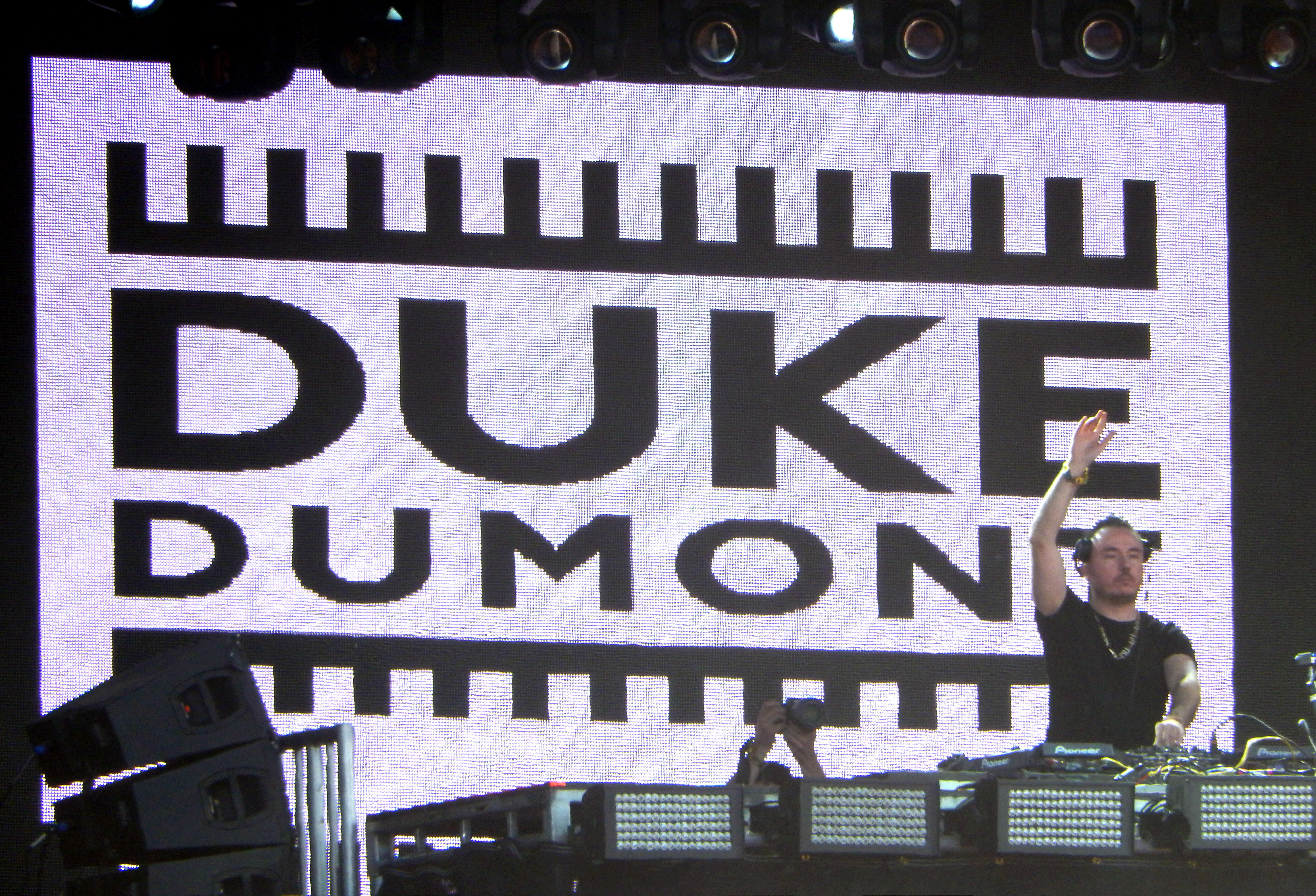 Duke Dumont